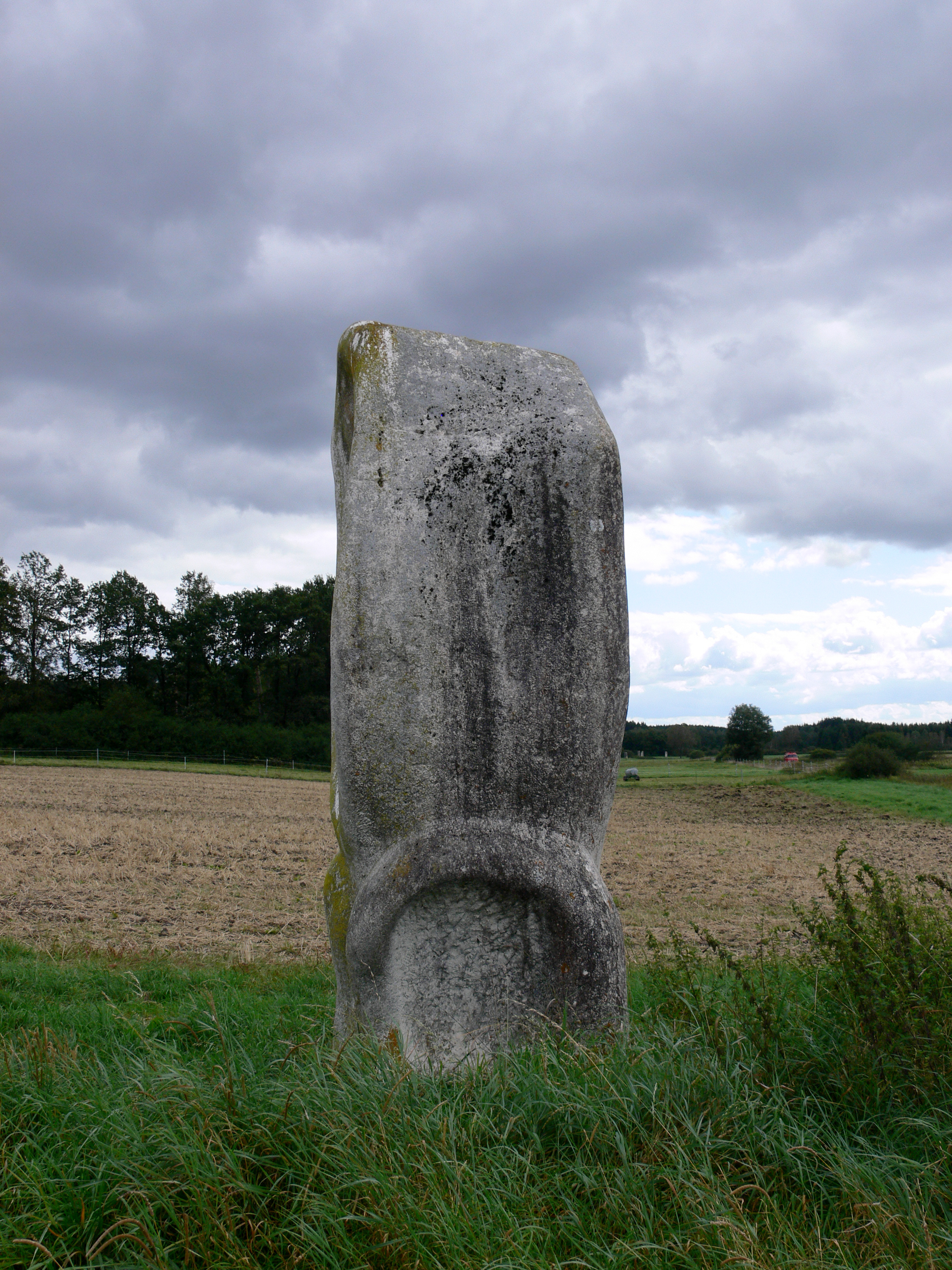 Skulpturenfeld Oggelshausen, Landkreis Biberach Bildhauersymposium 1969/1970 (?) Kenneth Campbell, USA (* 1913): (ohne Titel)